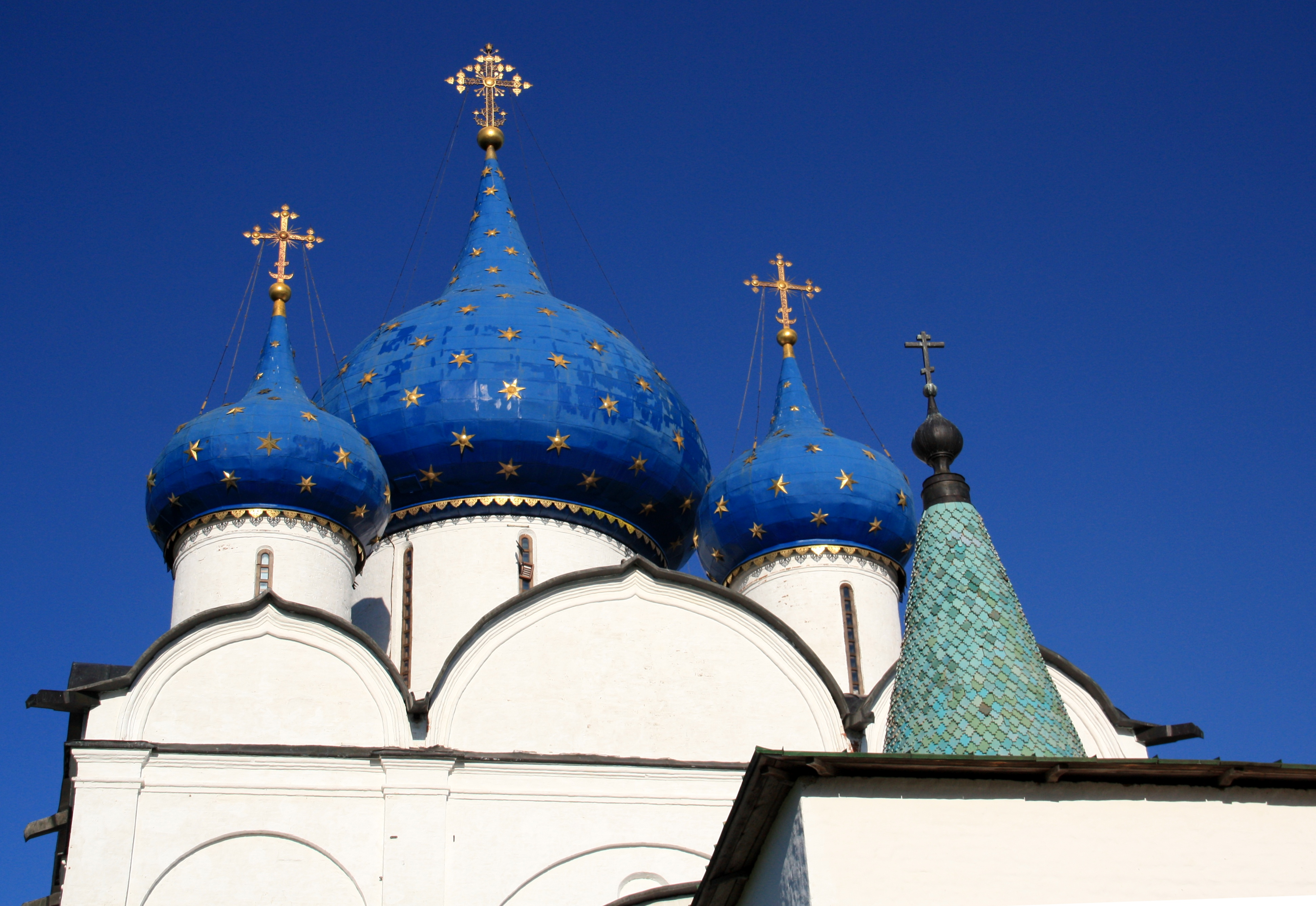 Собор Богородице-Рождественский: улица Кремлевская, Лебедева, Суздаль, Суздальский район, Владимирская область